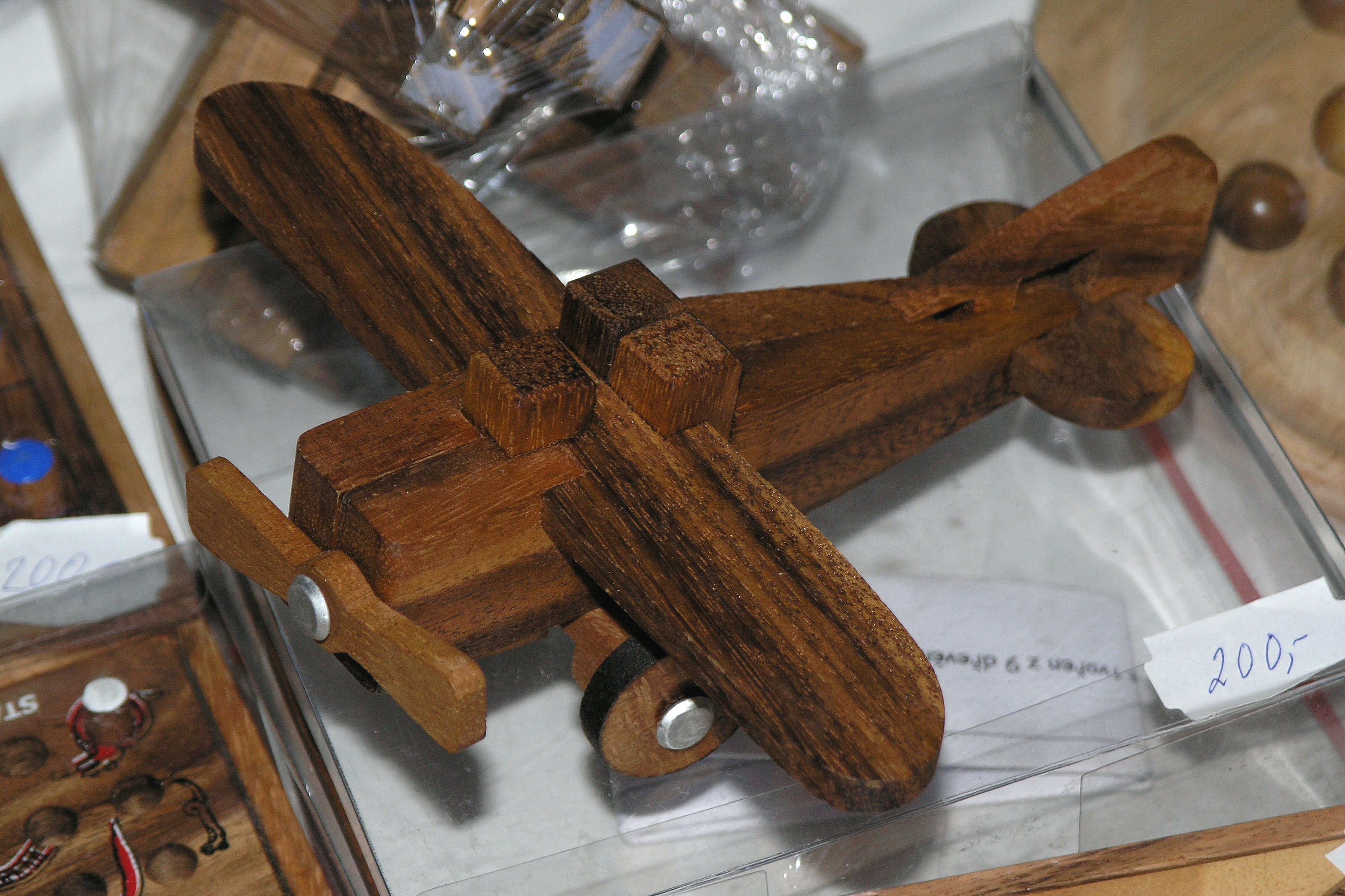 Hry a hlavolamy 2008 - festival her a hlavolamů v Praze, Holešovicích